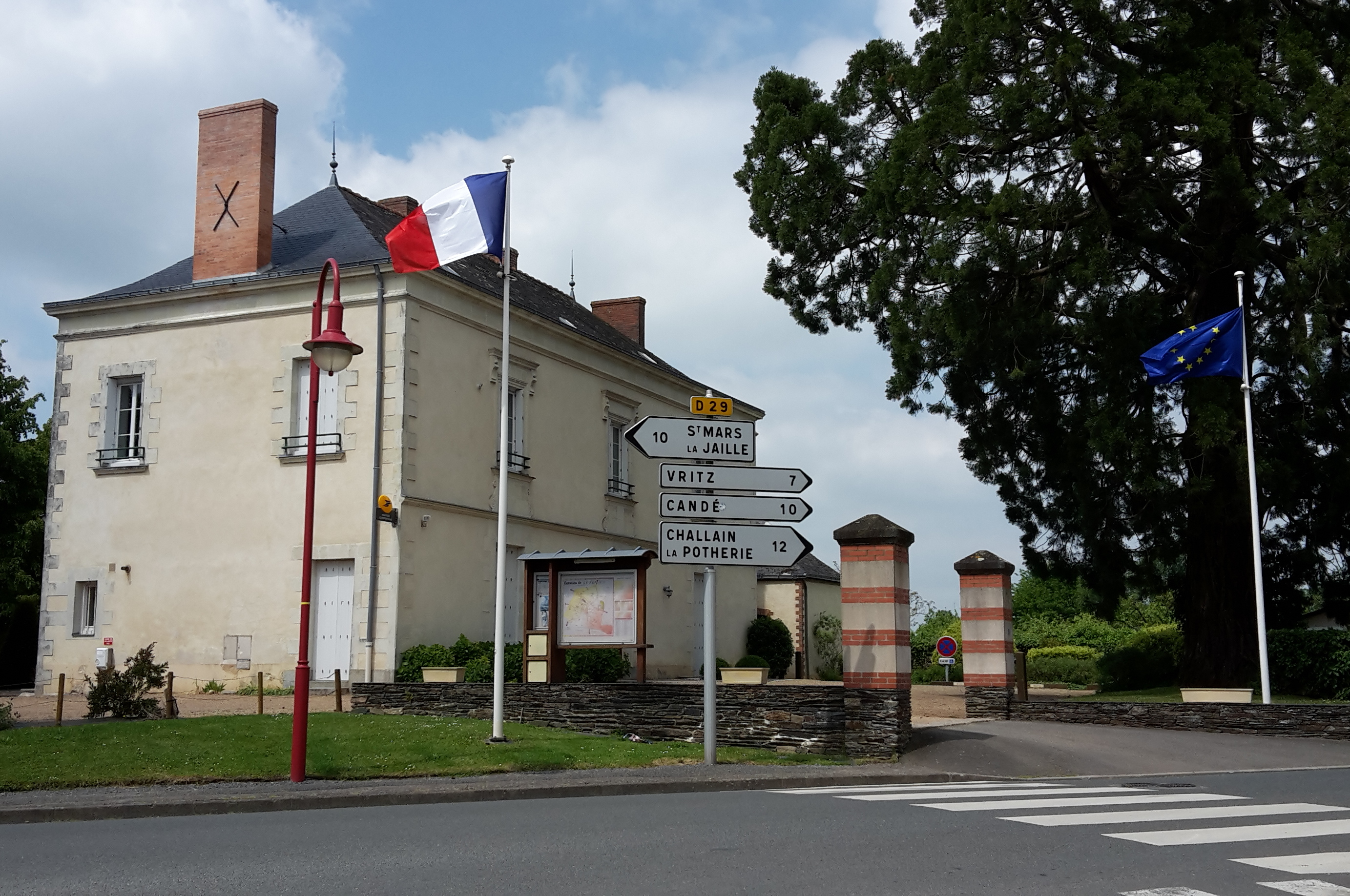 Mairie du Pin, Loire-Atlantique, France.